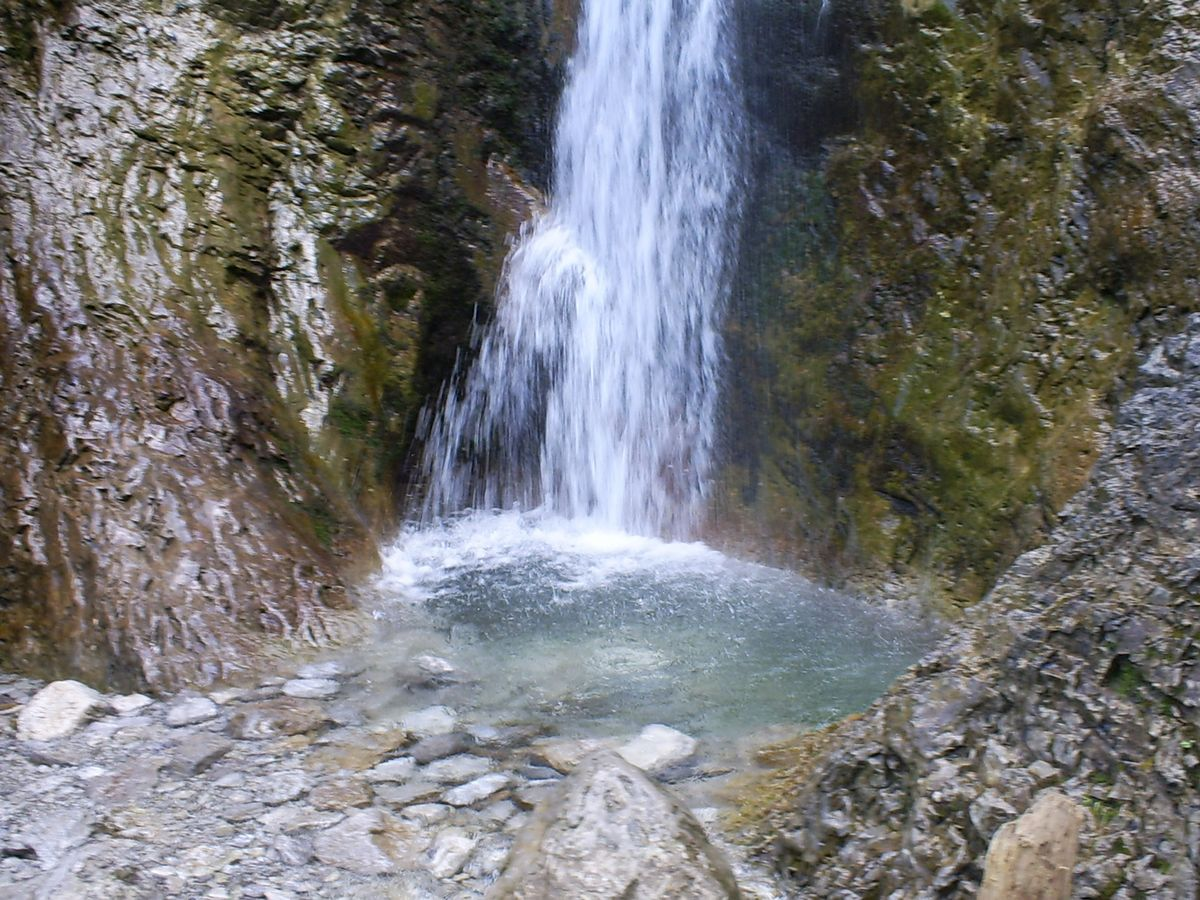 Siklawica - kocioł eworsyjny